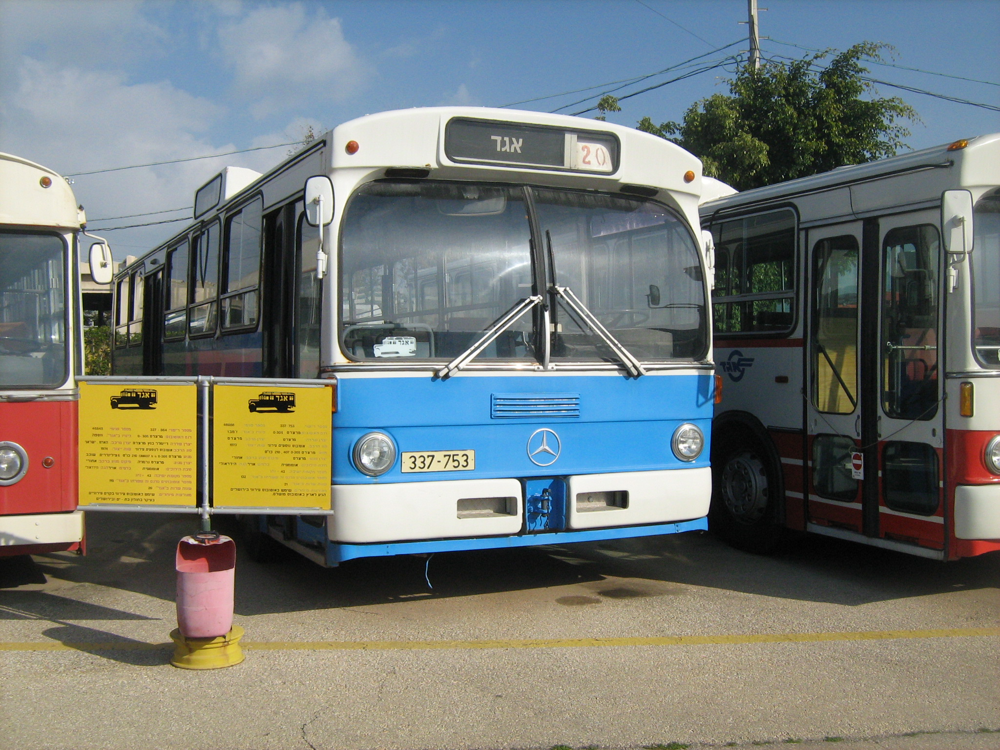 מוזיאון אגד בחולון